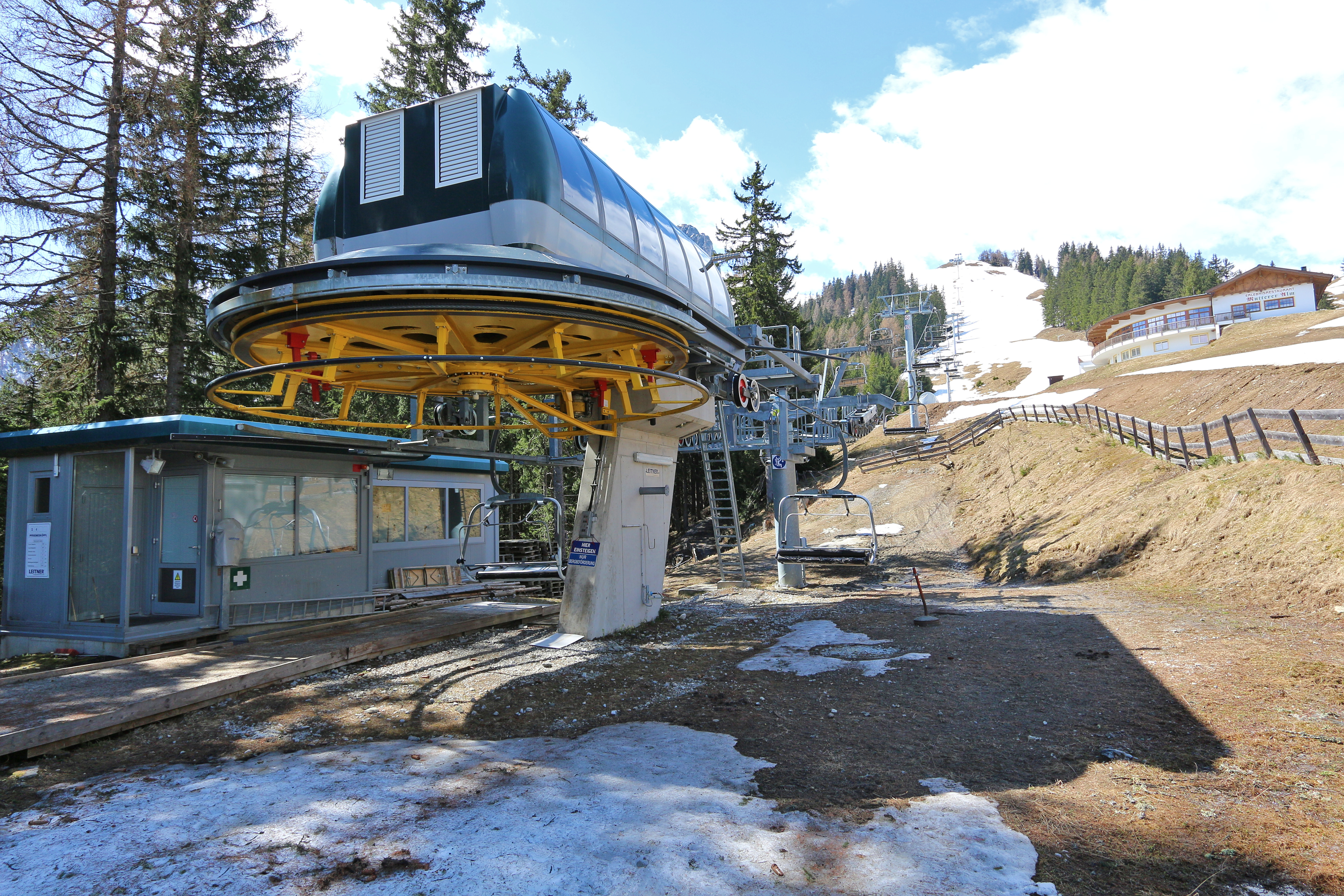 Pfriemesköpfl-Lift im Schigebiet Muttereralmbahn